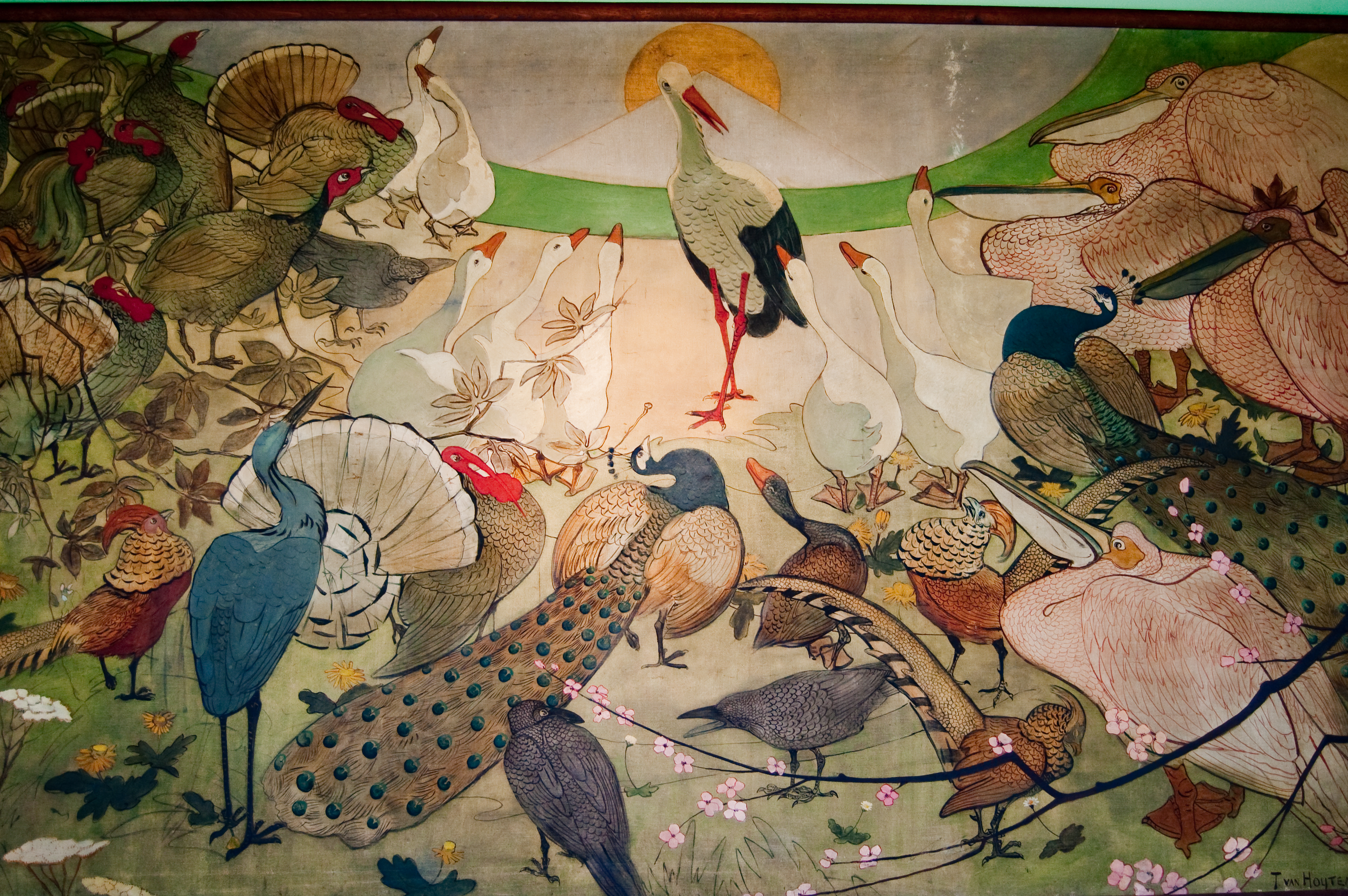 Terugkeer van den Ooievaer, Theo Hoytema(Toegepaste kunst en Design, zaal 47) Return of the stork